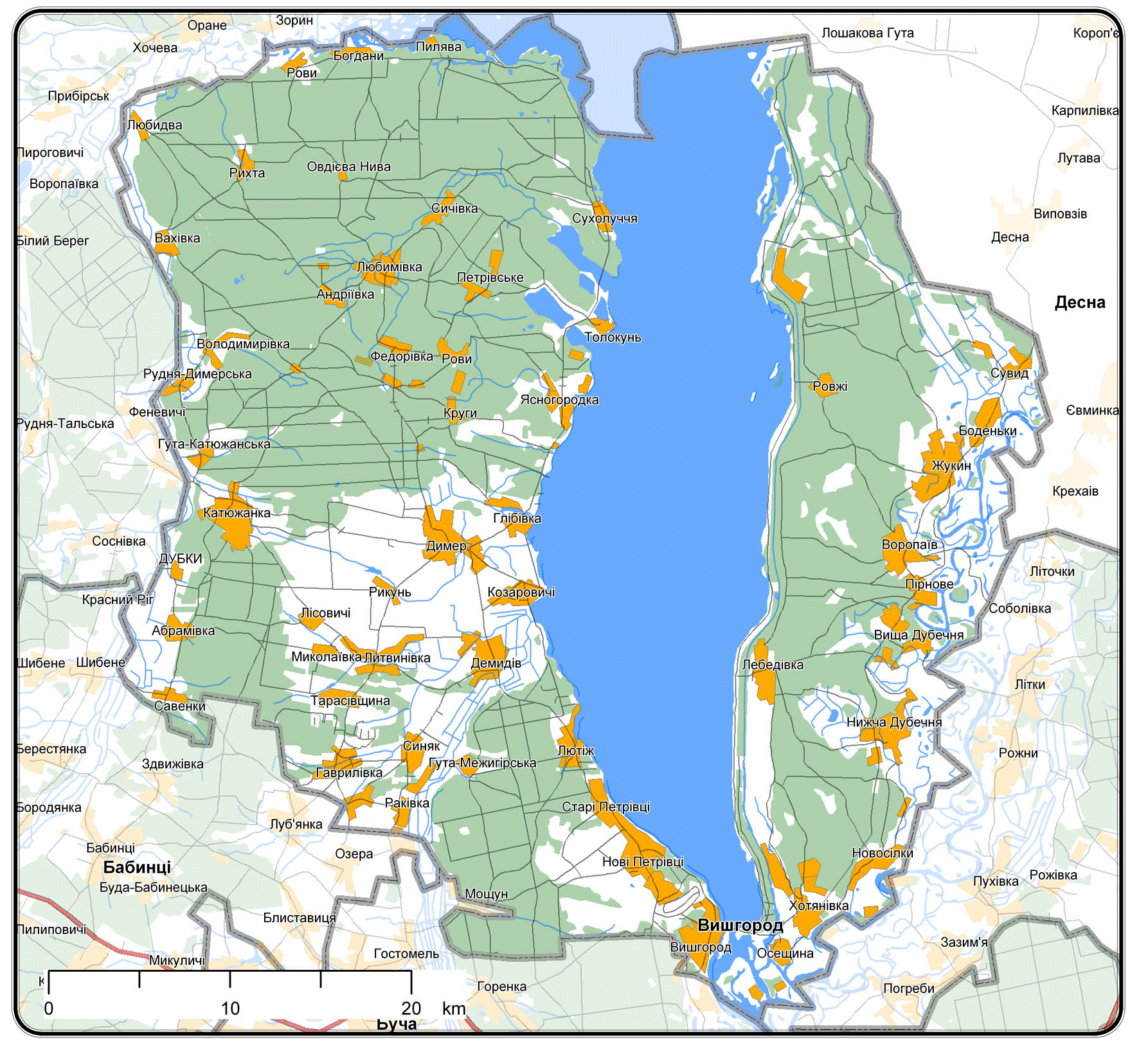 Мапа Вишгородського району